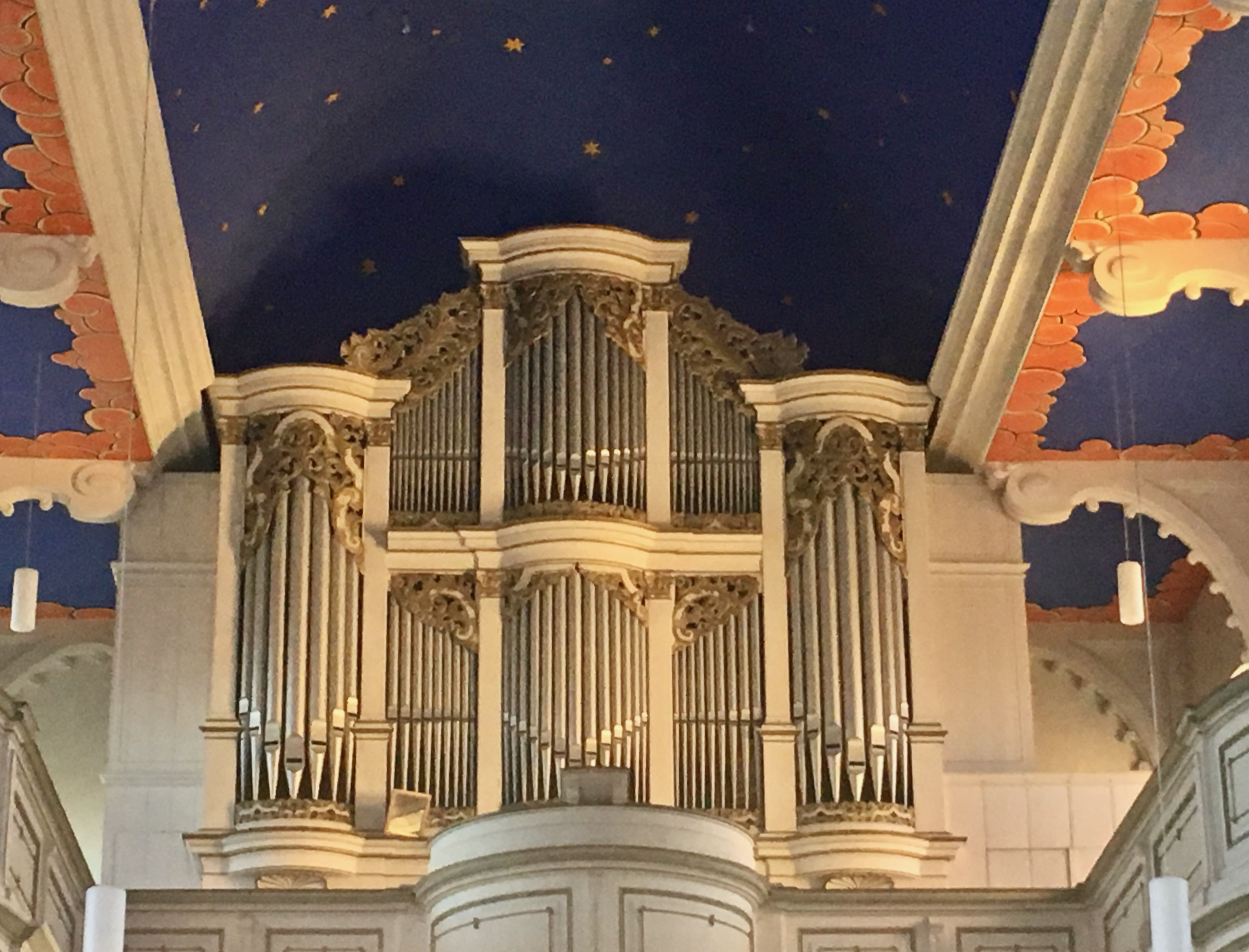 Orgel der Schlosskirche